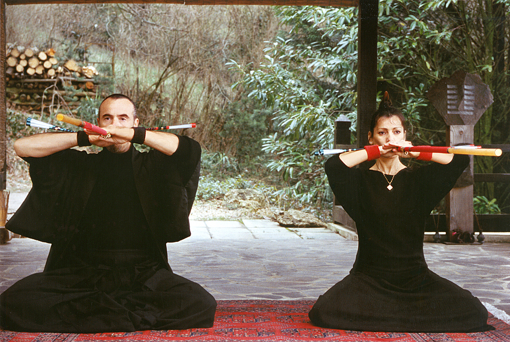 La Voie du Sarbacana est une parfaite symbiose entre la méditation et l'action.